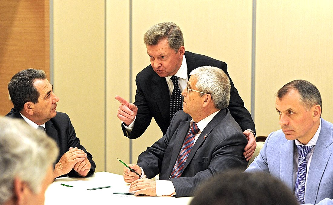 Перед началом встречи с представителями крымско-татарской общины. Слева направо: профессор, доктор медицинских наук Дилявер Акмаллаев, полномочный представитель Президента в Крымском федеральном округе Олег Белавенцев, Председатель Совета народной партии Милли Фирка Васви Абдураимов, председатель Госсовета Республики Крым Владимир Константинов